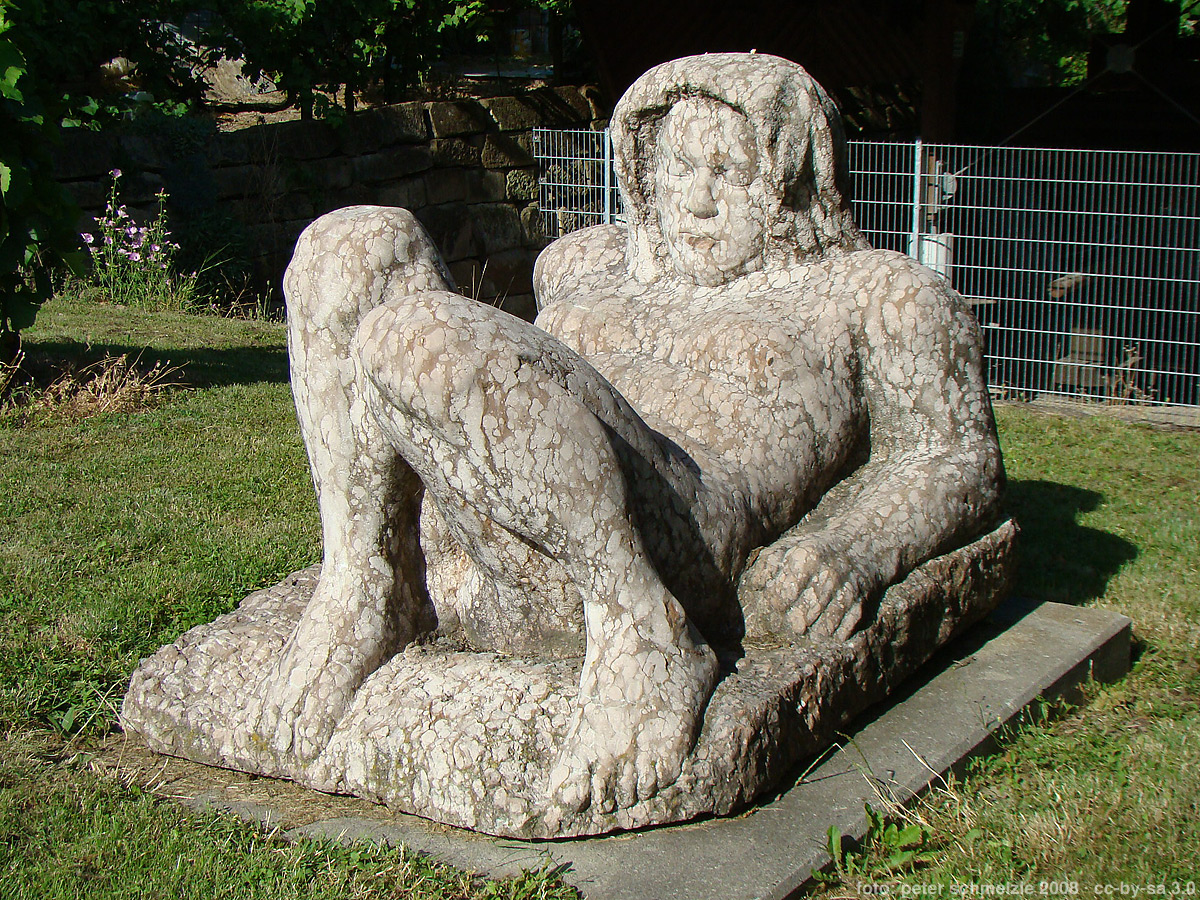 Susanne Knorr: „Große Liegende“ (um 1980) aus Ruhpoldinger Marmor am Wein-Panorama-Weg längs des Wartbergs in Heilbronn